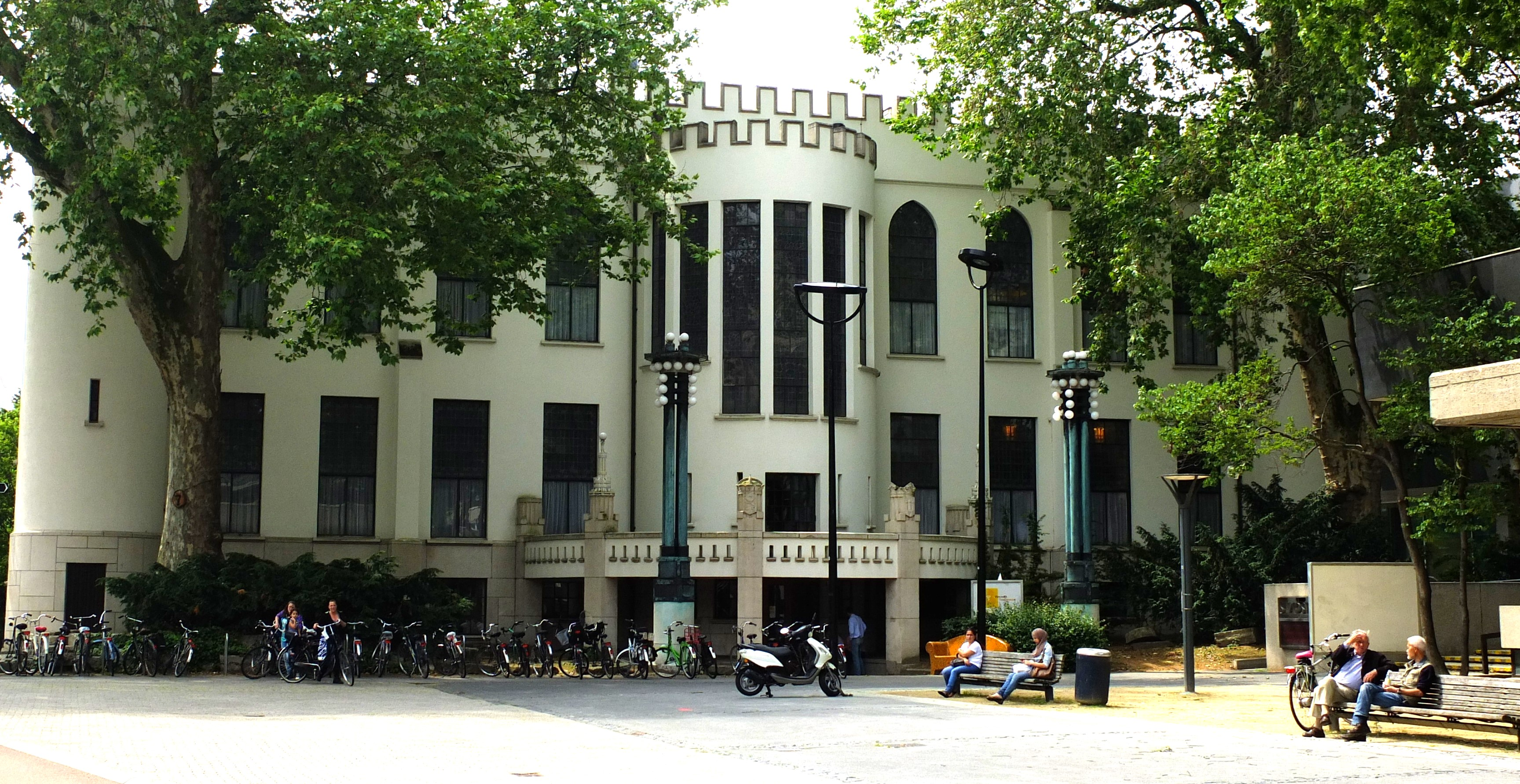 Zicht op een deel van het Paleis-Raadhuis, Stadhuisplein 128 in Tilburg